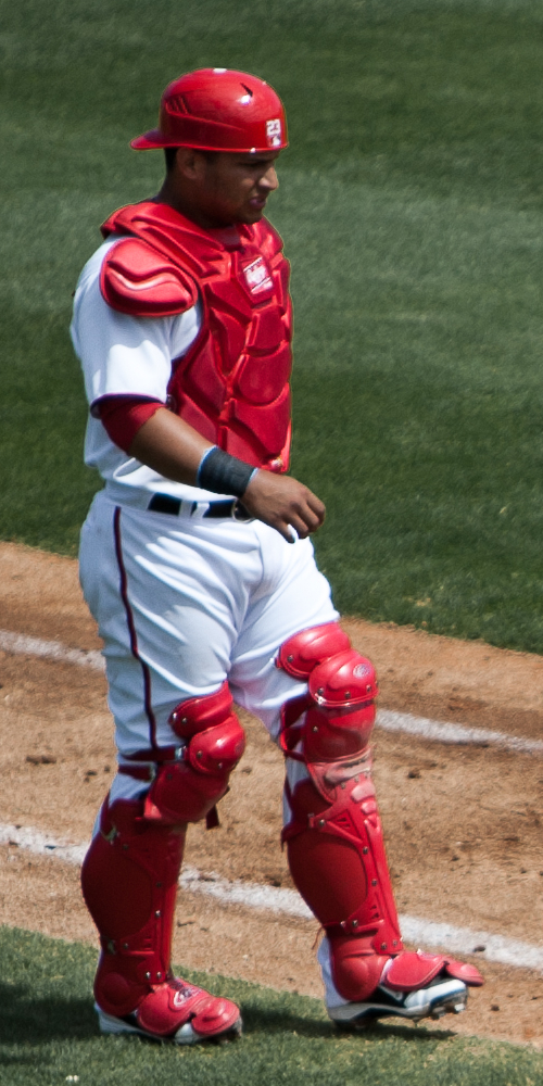 Jhonatan Solano